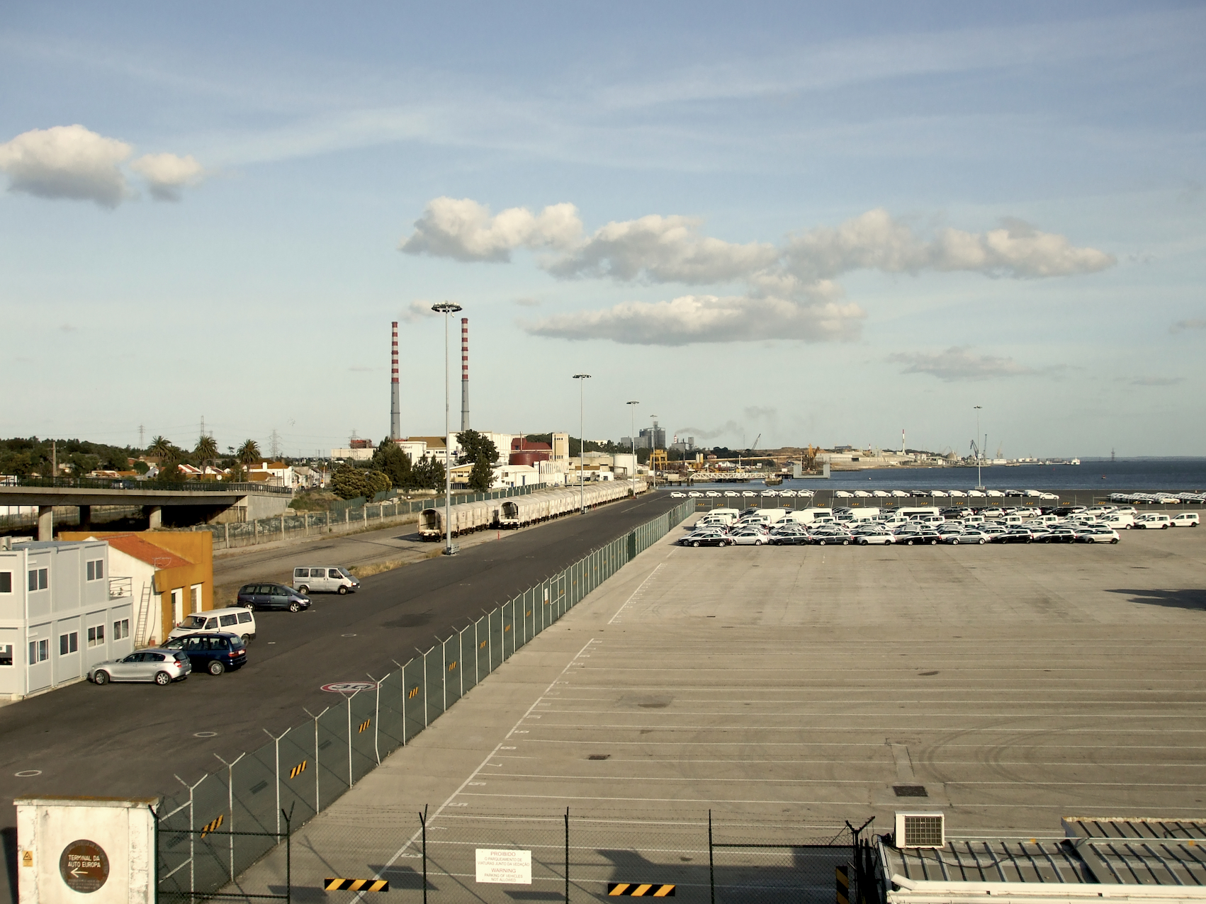 Terminal roll-on/roll-off, parcialmente concessionado pelo Porto de Setúbal à Autoeuropa. Local: Setúbal Data e hora: 7 de Abril de 2009 [18h33] na placa, pode ler-se: Administração dos Portos de Setúbal e Sesimbra Terminal da Auto Europa Inaugurado em 20 de Julho de 1995, por Sua Exa. O Sr. Ministro do Mar, Eng. António Duarte Silva